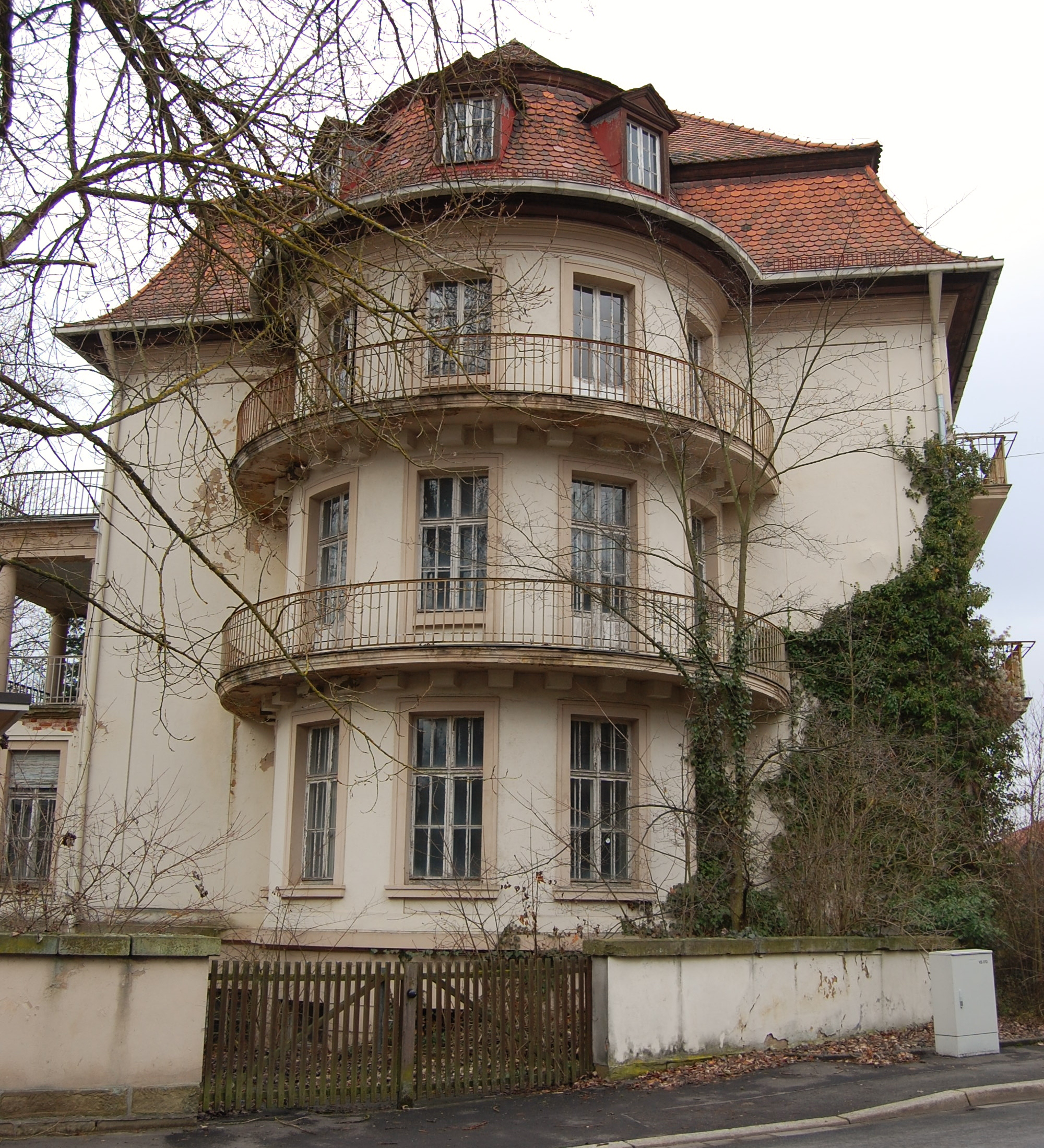 Der südliche halbrotundenförmige Vorsprung am ehemaligen Sanatorium Apolant in Bad Kissingen, Menzelstraße 8-10